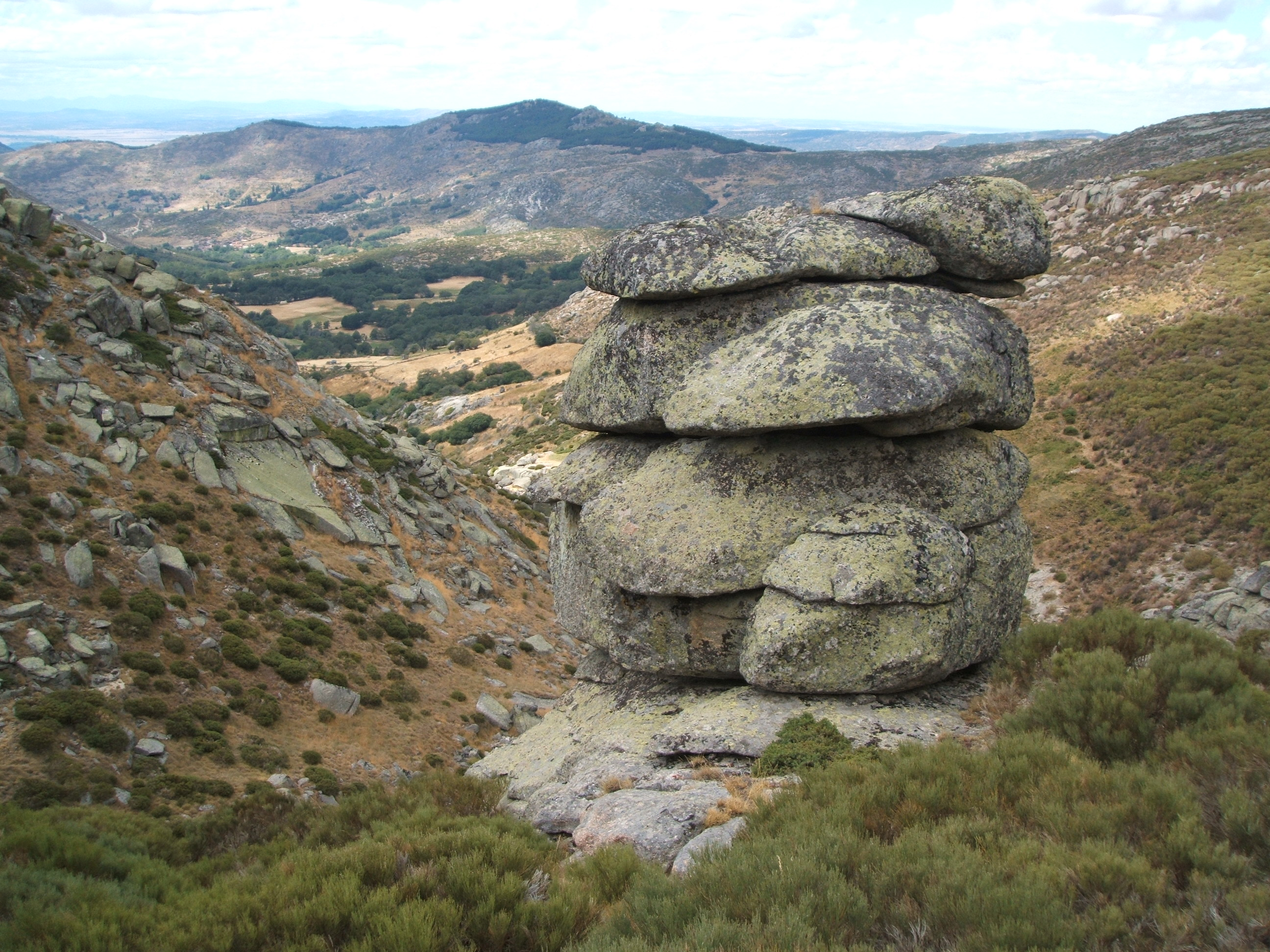 Mole granítica en Navacepedilla de Corneja (Ávila, España), cerca del arroyo de la Cruz del Valle. AUTOR: Alfredo (con permiso del autor)